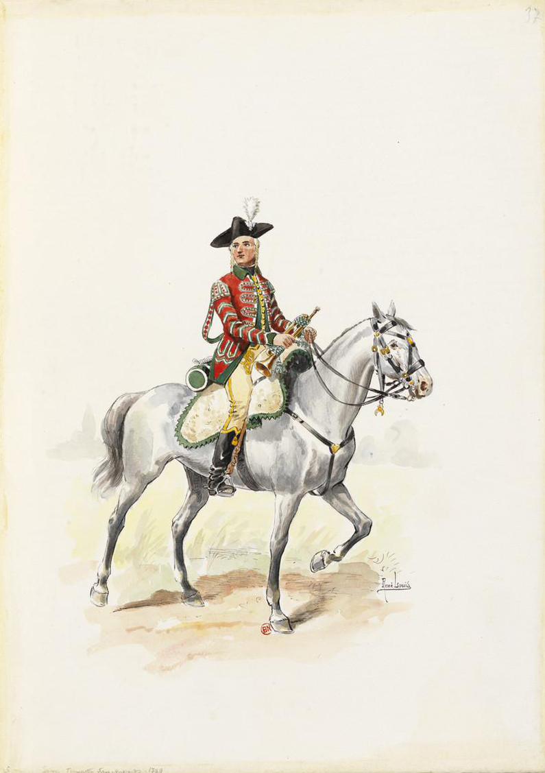 Trompette des Hussards de Saxe en 1789.